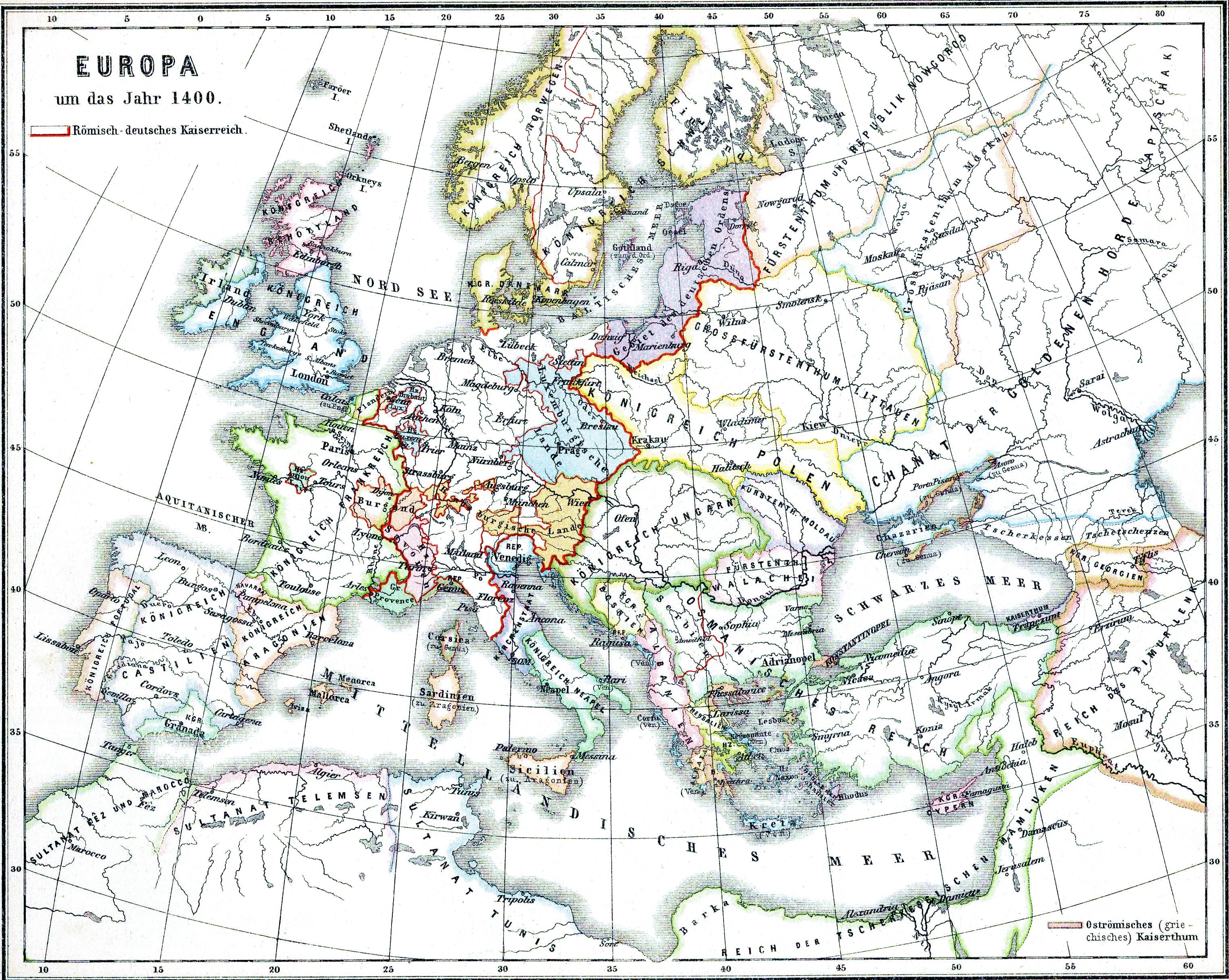 Europa im Jahre 1400